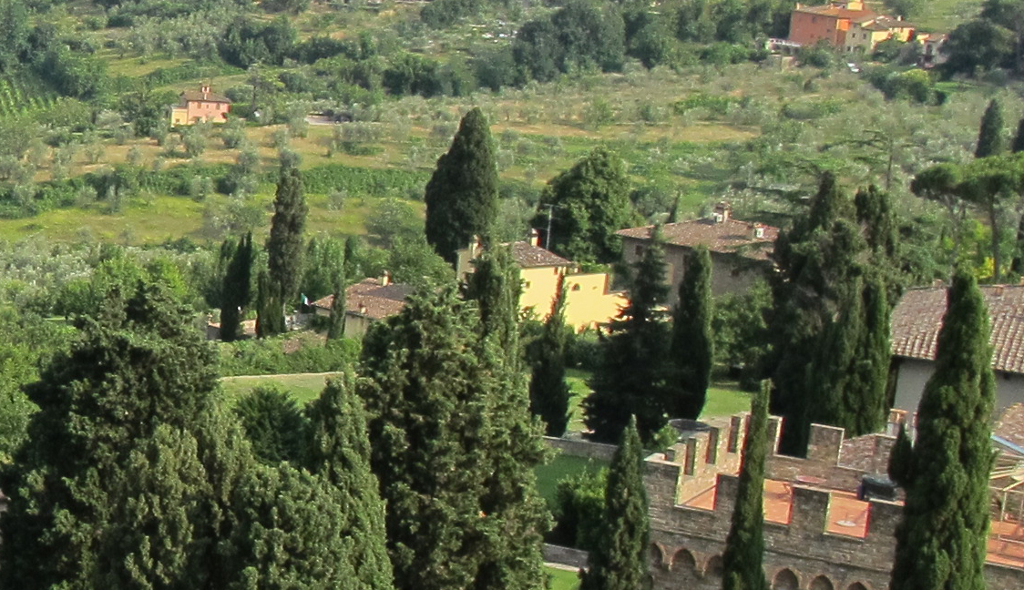 Torre del gallo, veduta, villa il teatro 1